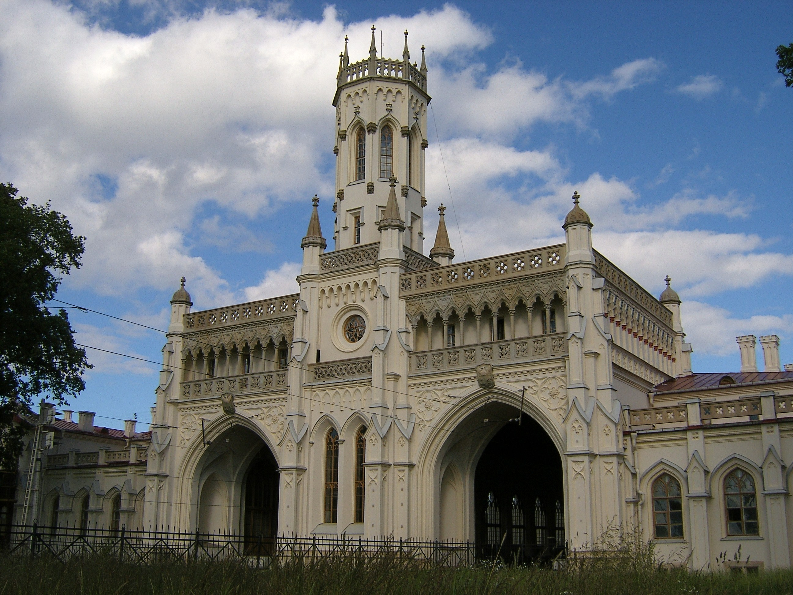 Станция Новый Петергоф